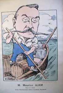 Caricature de Maurice Ajam, alors secrétaire d'état à la Marine Marchande